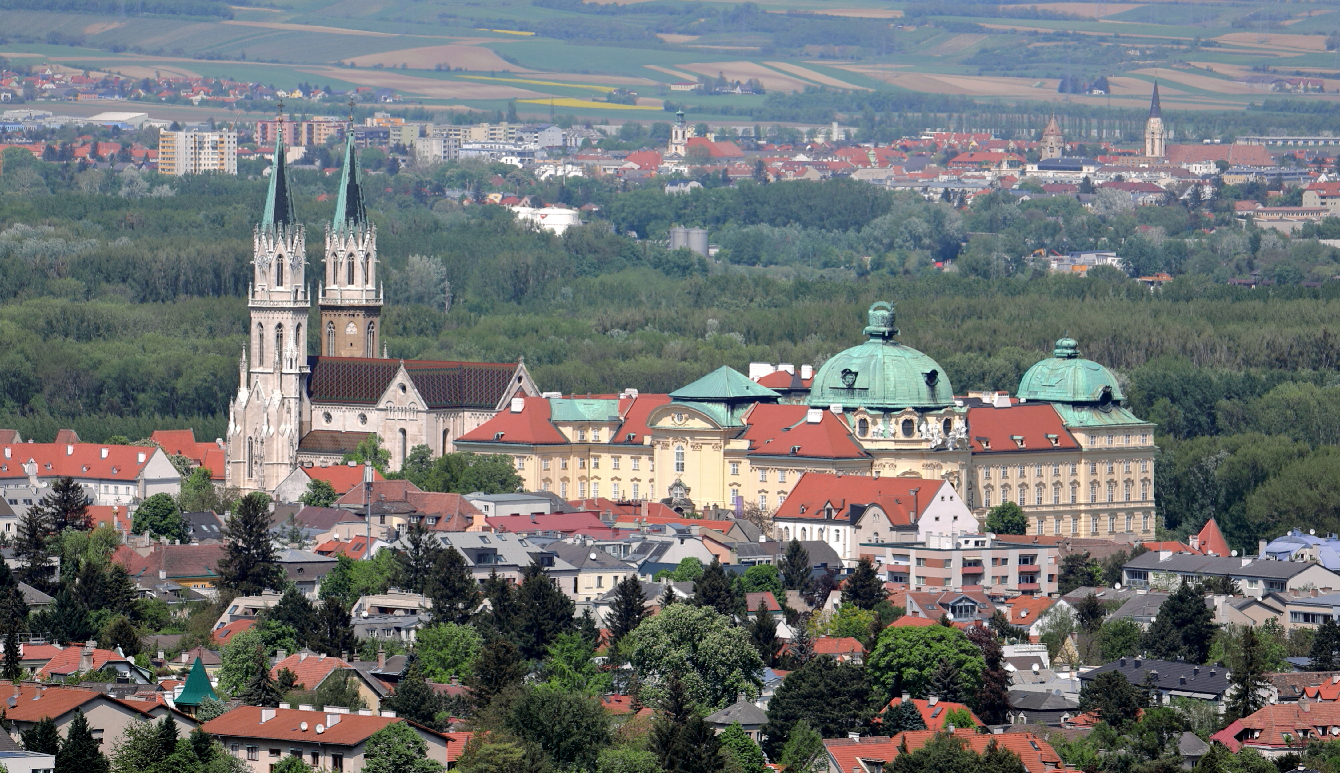 Südansicht des Augustiner-Chorherrenstiftes in der niederösterreichischen Stadt Klosterneuburg und im Hintergrund die Stadt Korneuburg. Rechts der barocke Kaisertrakt, der ab 1730 errichtet wurde und links die Stiftskirche, deren Grundsteinlegung 1114 durch Markgraf Leopold III. erfolgte.